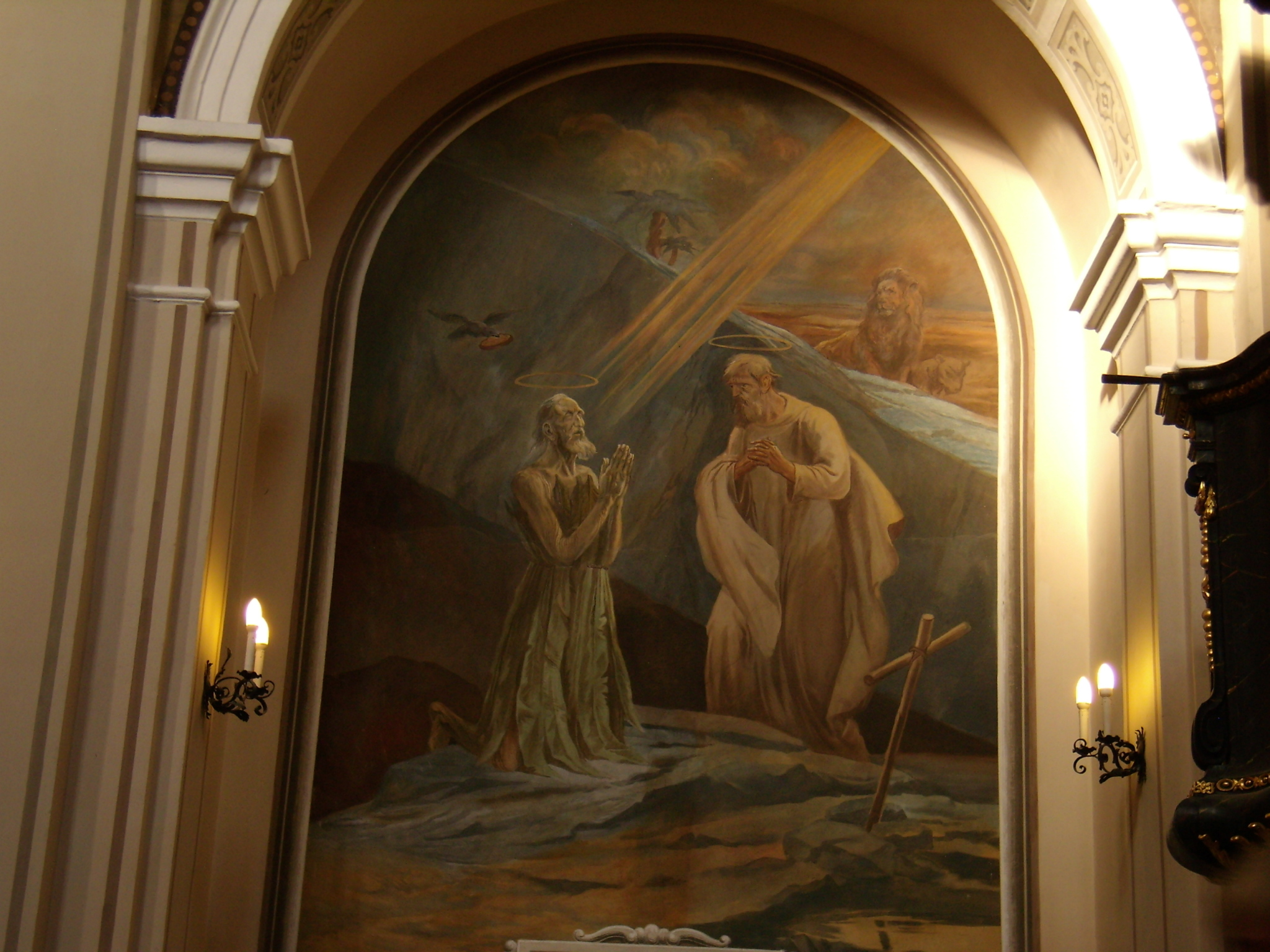 Remete Szent Pál ábrázolása a pálosok pécsi Lyceum templomában